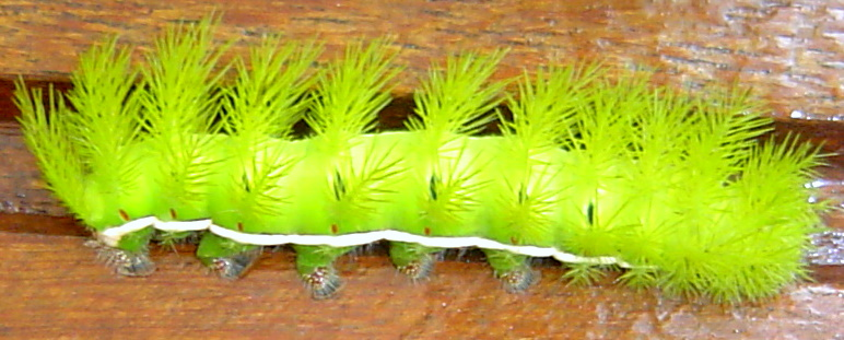 Automeris illustris. Place:Santa Catarina, Brazil